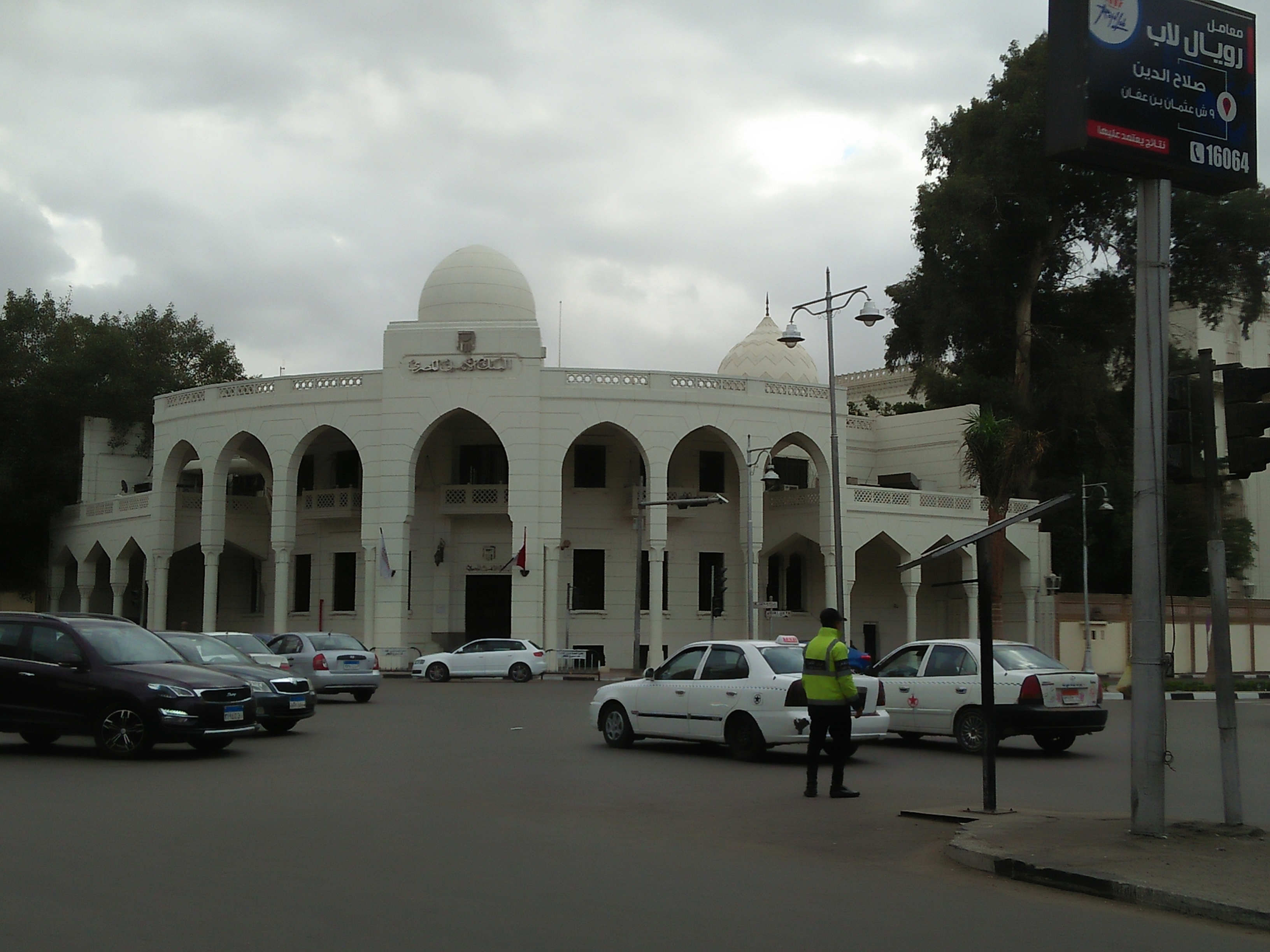 قصد الاتحادية - البنك الأهلي المصري